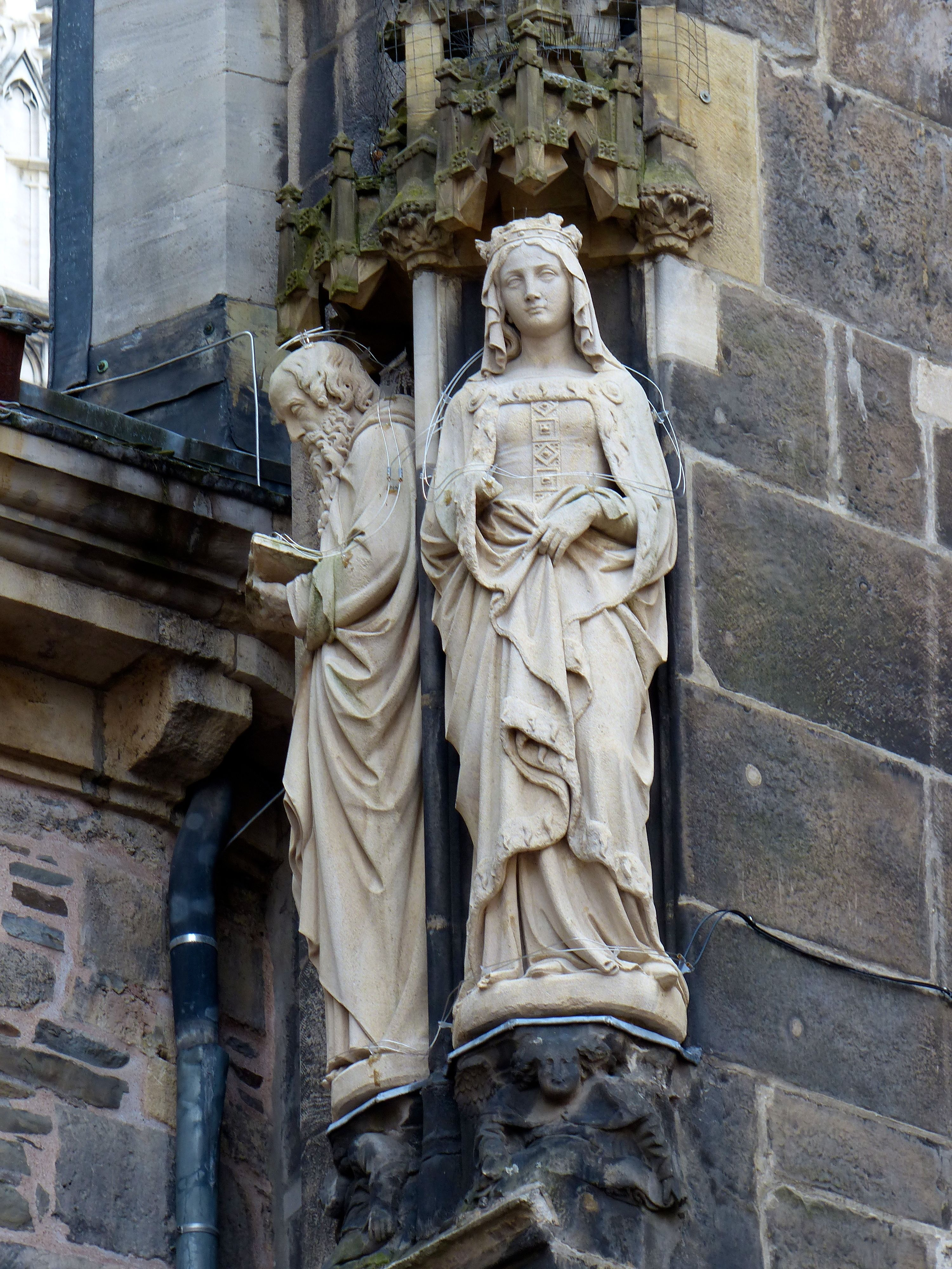 Aachener Dom: restaurierter Figurenschmuck an der Karls- und Hubertuskapelle